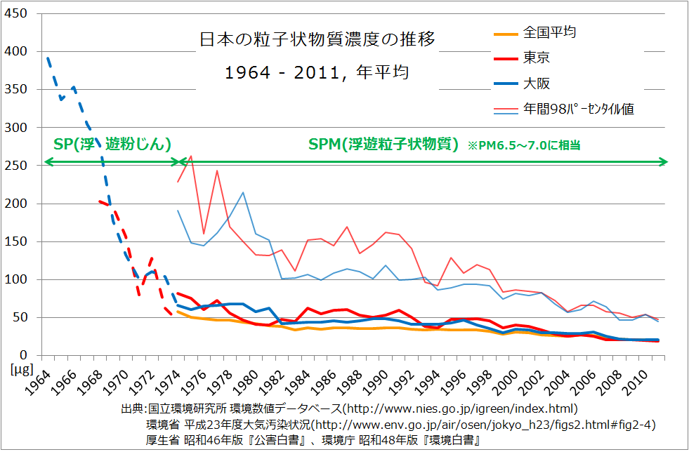 日本における粒子状物質の濃度のグラフ。東京（国設東京大気汚染測定所:東京都新宿区）、大阪（国設大阪大気汚染測定所:大阪市東成区）、および国内多数地点の平均値。 出典 国立環境研究所 環境数値データベース, 2014-04-06閲覧. 環境省 平成23年度大気汚染状況 浮遊粒子状物質, 2014-04-06閲覧. 厚生省 昭和46年版『公害白書』、環境庁 昭和48年版『環境白書』(いずれも環境省の環境白書・循環型社会白書・生物多様性白書のページで公開されている資料を参照, 2014-04-06閲覧）.